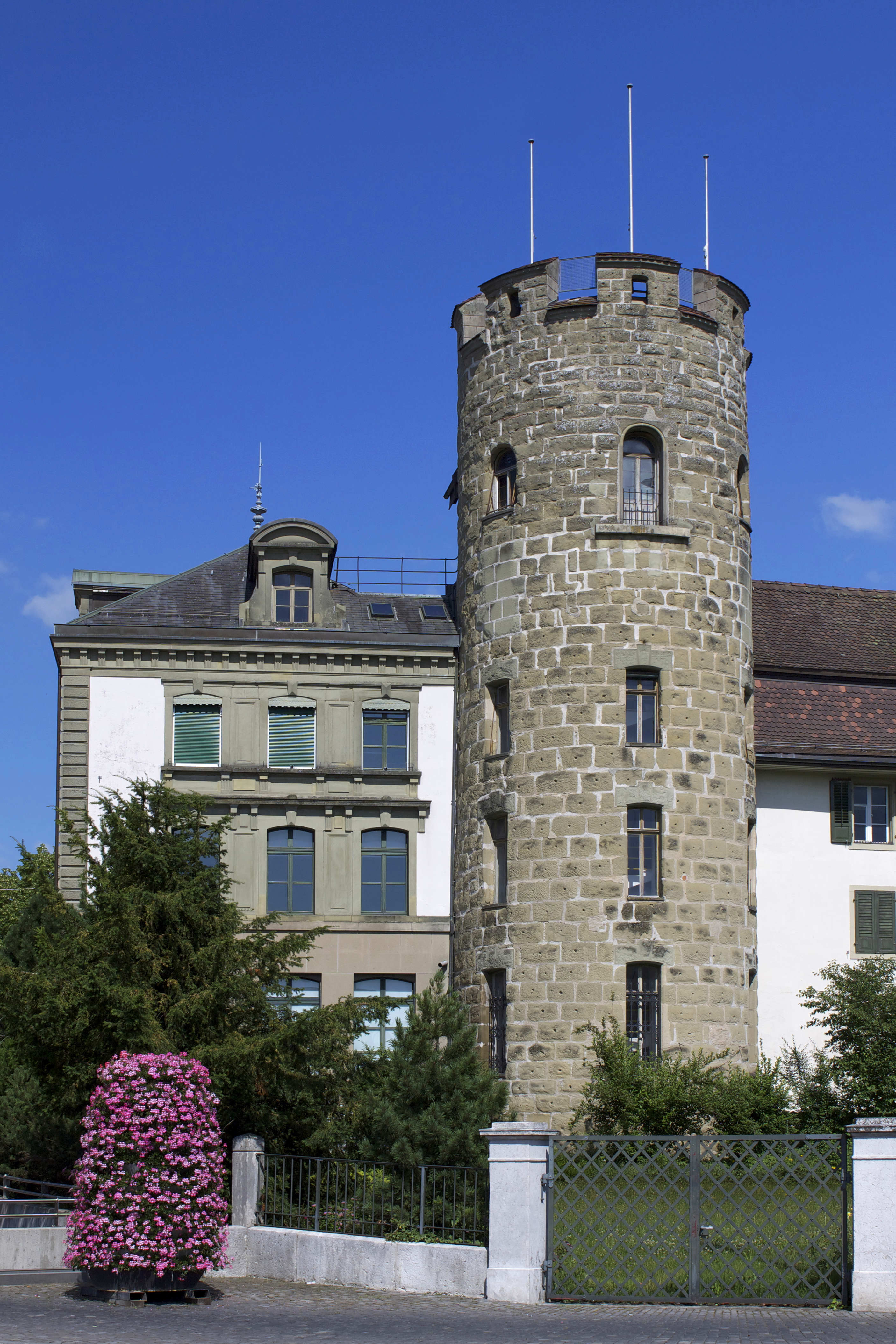 Der Folterturm in Zofingen. Hinter dem Zaun ist der geschützte grüne Gürtel um die Altstadt zu sehen.